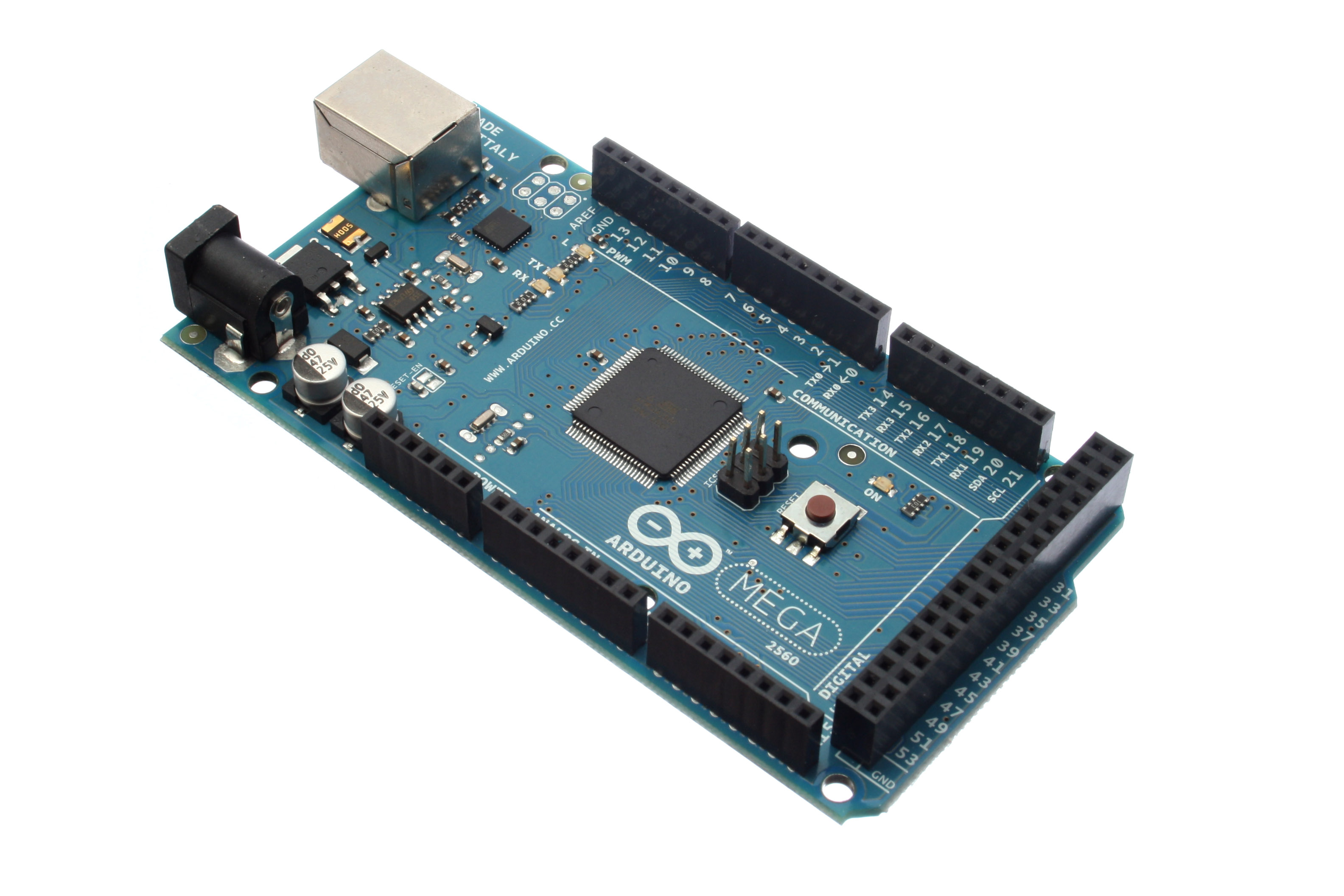 Arduino Mega 2560.